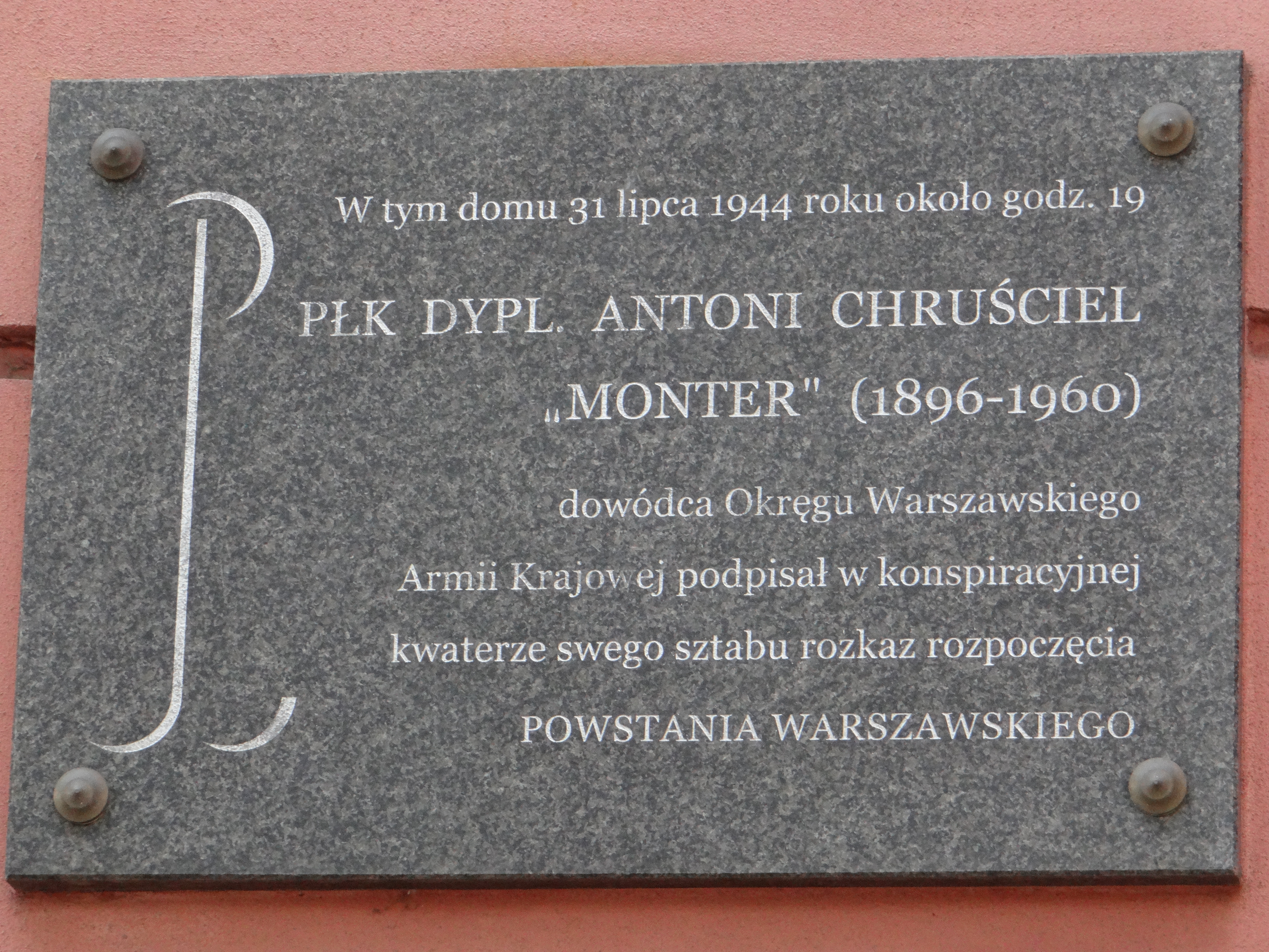 Tablica poświęcona pamięci podpisania przez płk Antoniego Chruściela rozkazu rozpoczęcia Powstania Warszawskiego